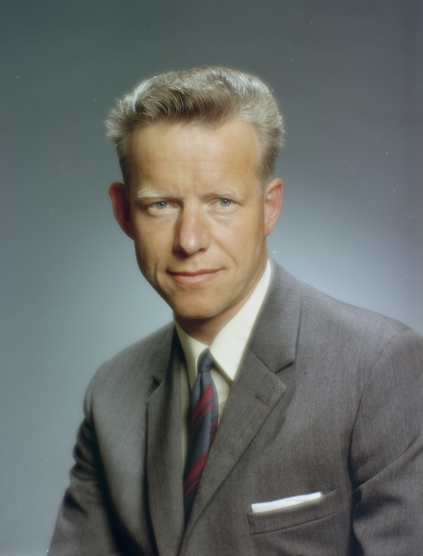 Fredrik Thoresen, portrett, mann, sivilingeniør, direktør for Standard telefon- og kabelfabrikk, brystbilde.